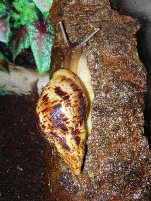 Foto einer Achatina reticulata